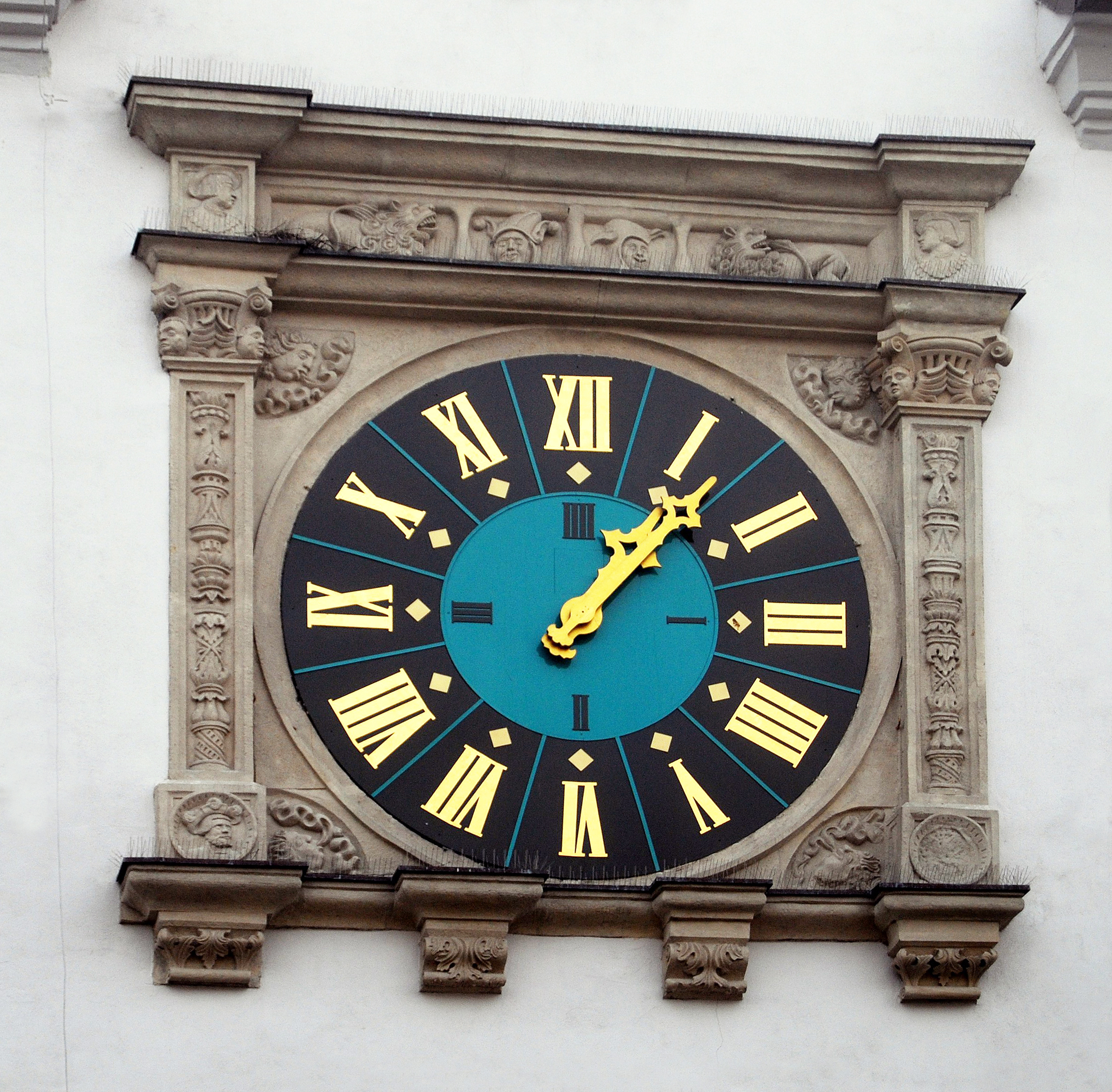 Ratusz w Lubaniu, woj. dolnośląskie